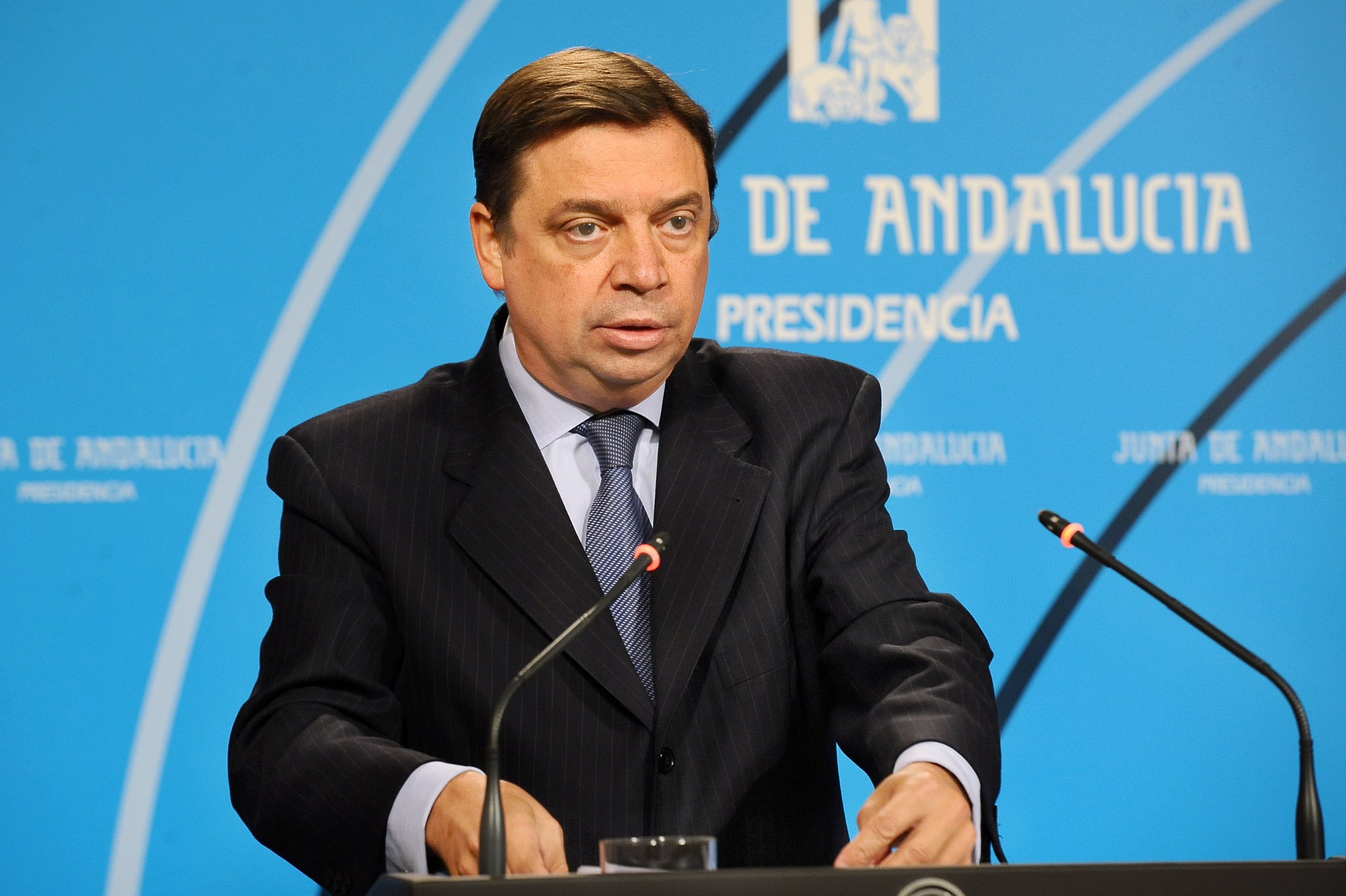 12.11.27-Consejero Agricultura-1